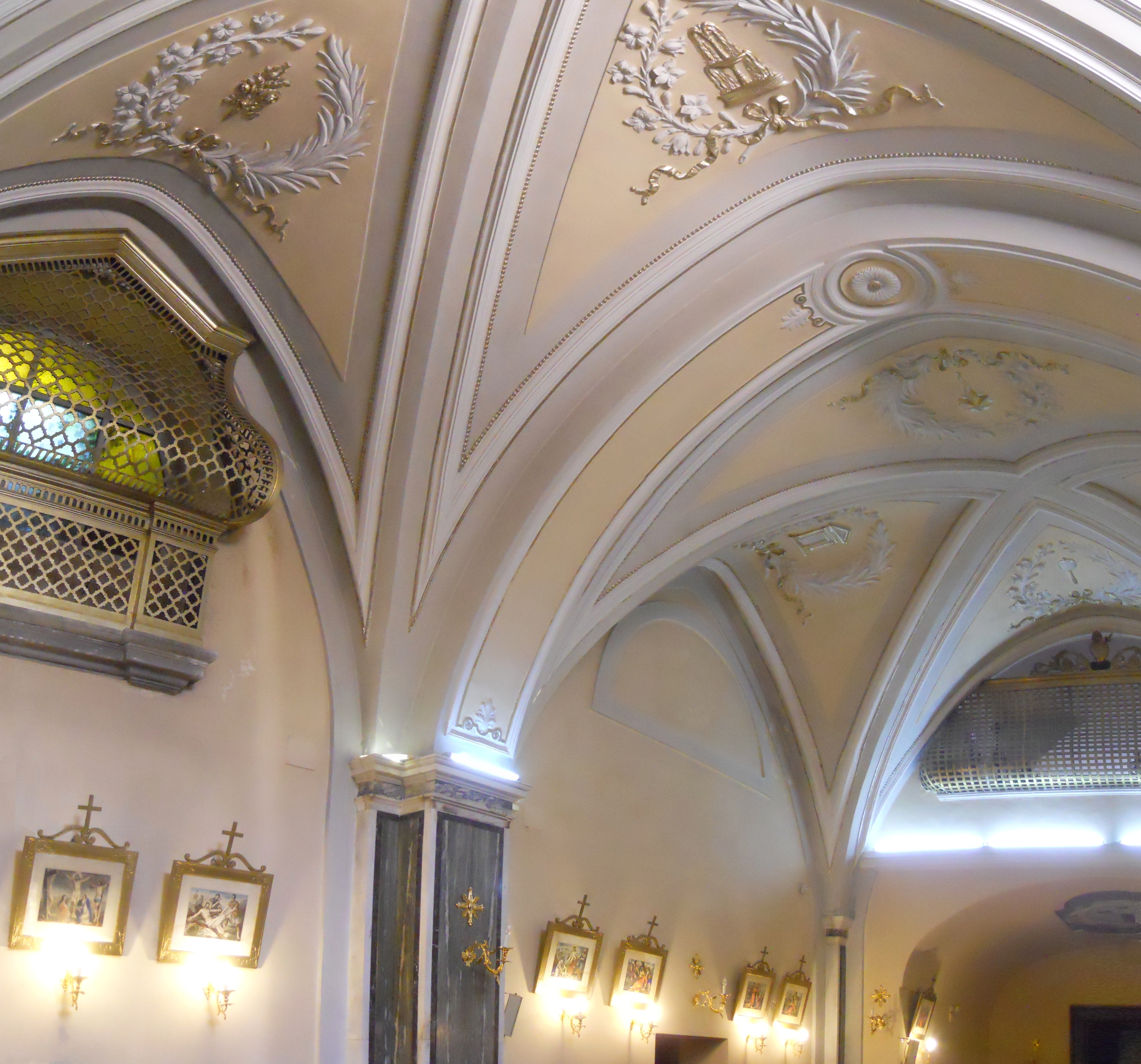 La volta a crociera della navata della chiesa della Santissima Addolorata a Gaeta